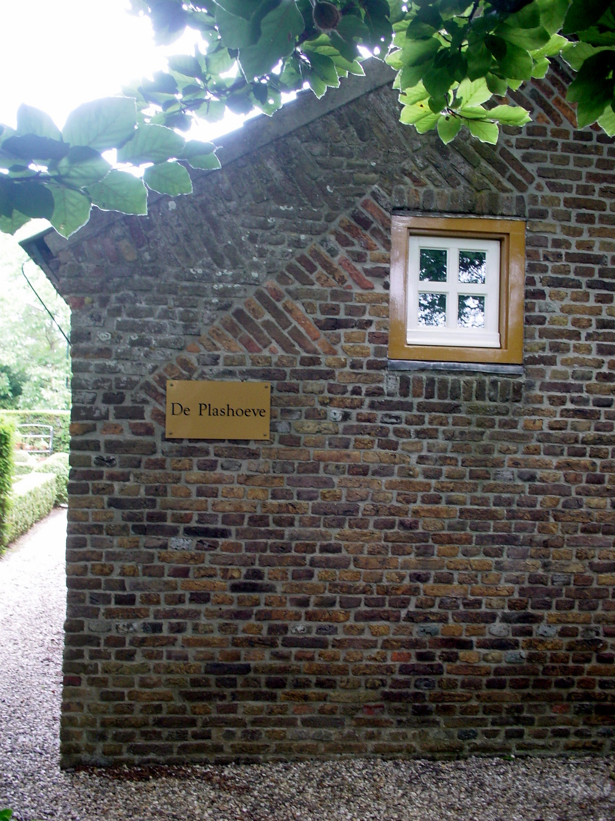 De westgevel met bouwsporen van het verhogen van de muur